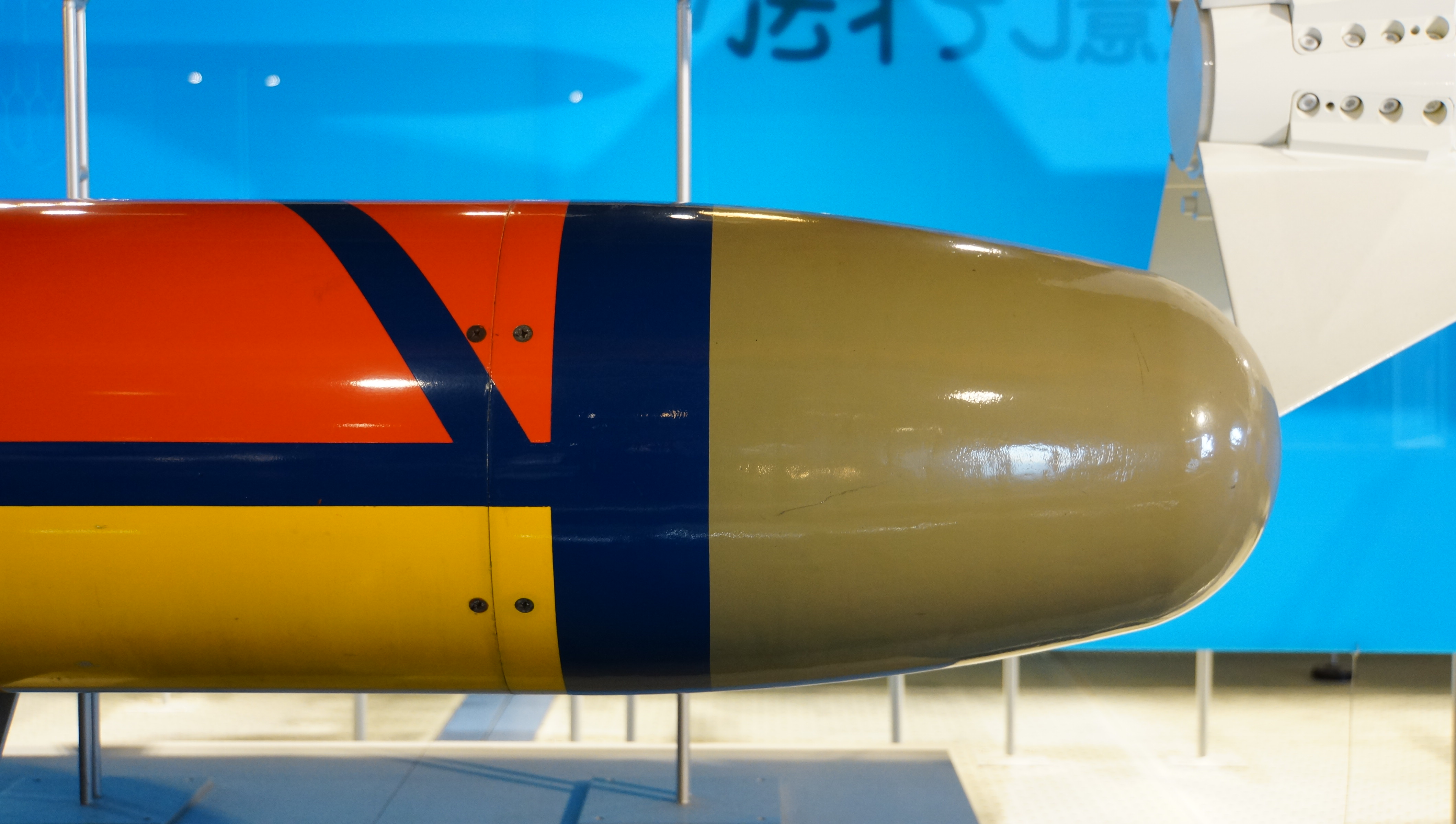 航空自衛隊 80式空対艦誘導弾（試験弾） シーカー部。 14年11月24日 浜松基地広報館内にて。